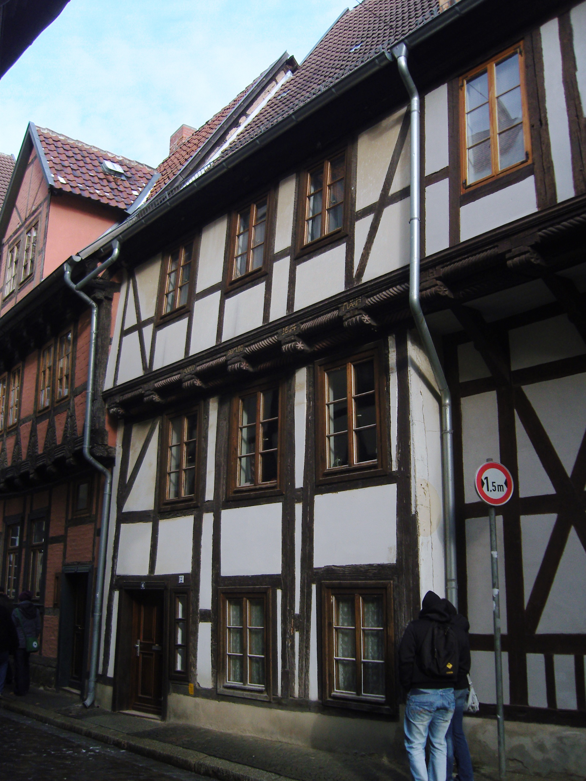 Denkmalgeschütztes Wohnhaus in der Straße Hölle 4 in Quedlinburg